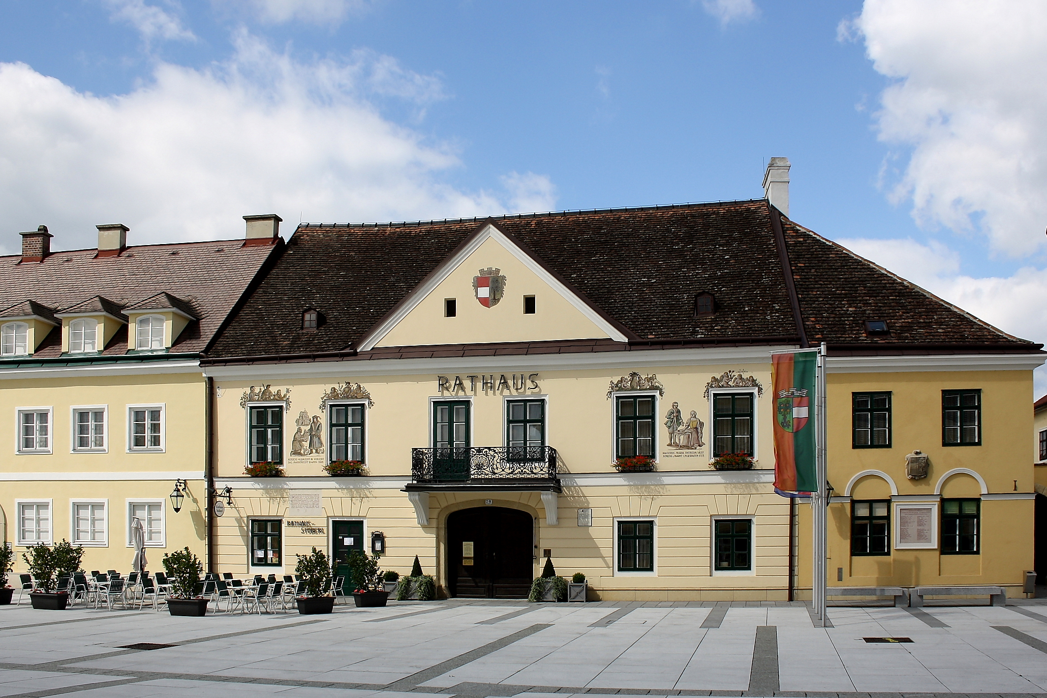 Das Rathaus von Laxenburg